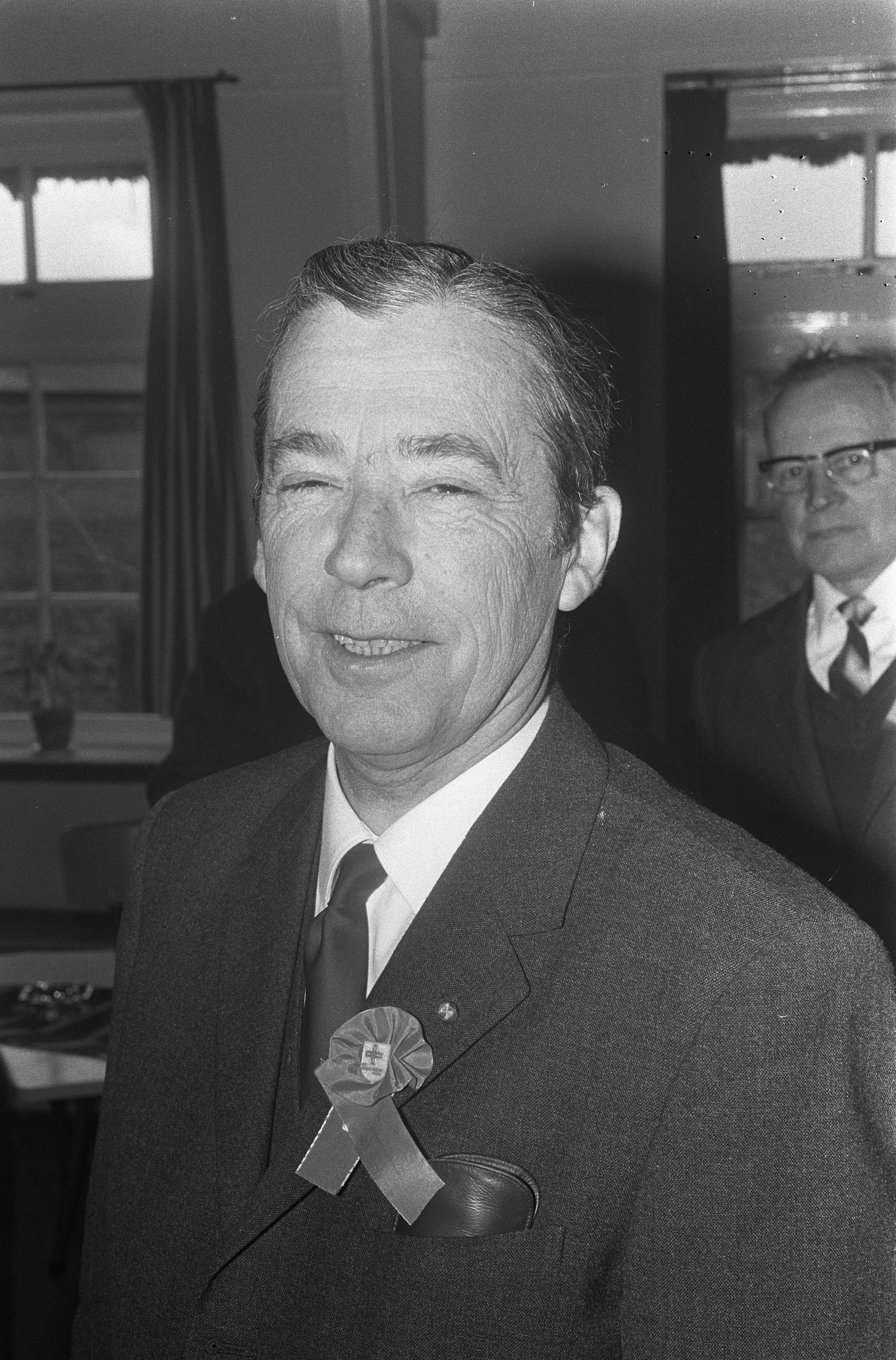 Collectie / Archief : Fotocollectie Anefo Reportage / Serie : [ onbekend ] Beschrijving : koningin Juliana in Uddel, Burgemeester A. L. des Tombe van Apeldoorn (kop) Datum : 30 maart 1967 Locatie : Gelderland, Uddel Trefwoorden : bezoeken, burgemeesters, koninginnen, koppen Persoonsnaam : Juliana (koningin Nederland) Fotograaf : Koch, Eric / Anefo Auteursrechthebbende : Nationaal Archief Materiaalsoort : Negatief (zwart/wit) Nummer archiefinventaris : bekijk toegang 2.24.01.05 Bestanddeelnummer : 920-1947